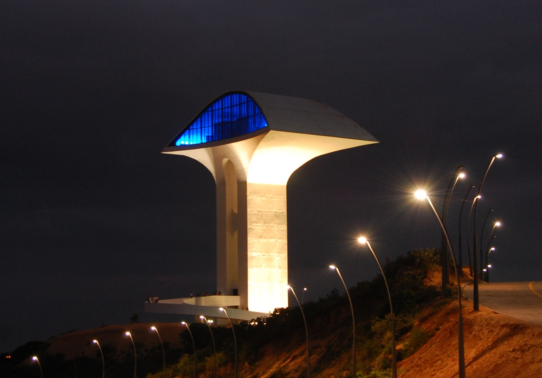 Parque da Cidade Dom Nivaldo Monte em Natal - RN - Brasil.